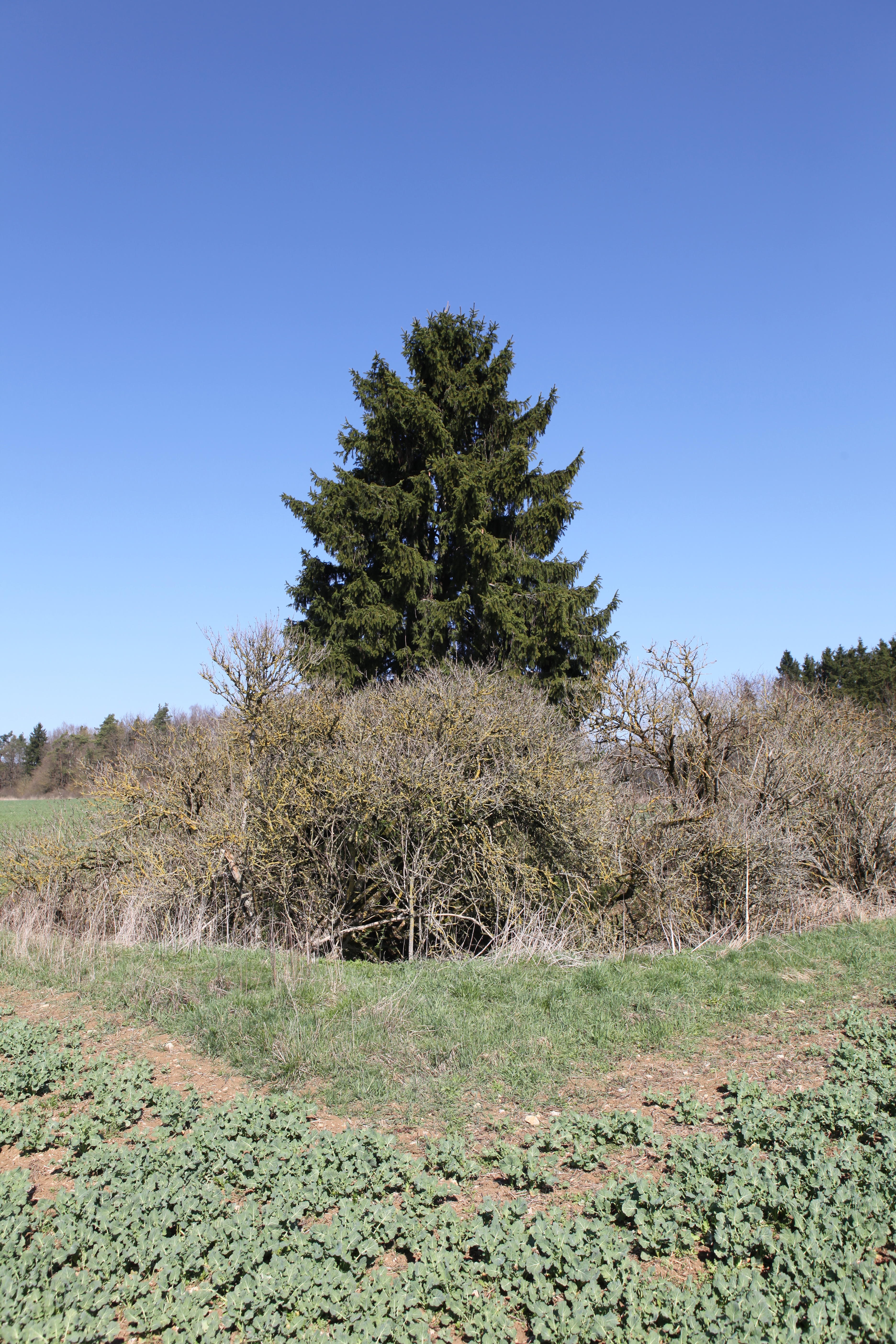 Doline Donnerloch bei Drossenhausen, Meeder